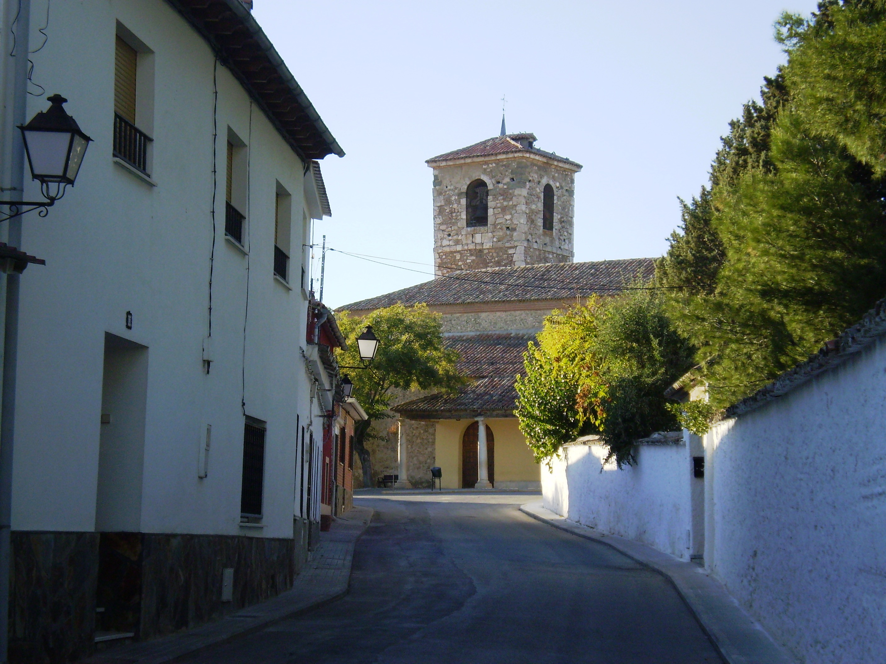 Mayor St. Fuentidueña de Tajo, Community of Madrid, Spain